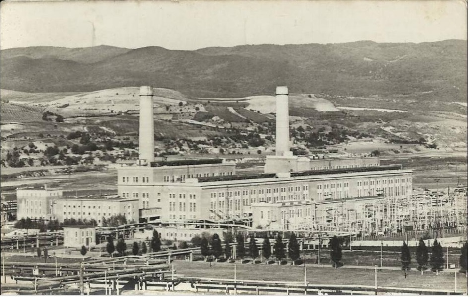 Panoramă a Întreprinderii de Electrocentrale Borzeşti, în anii 70'.